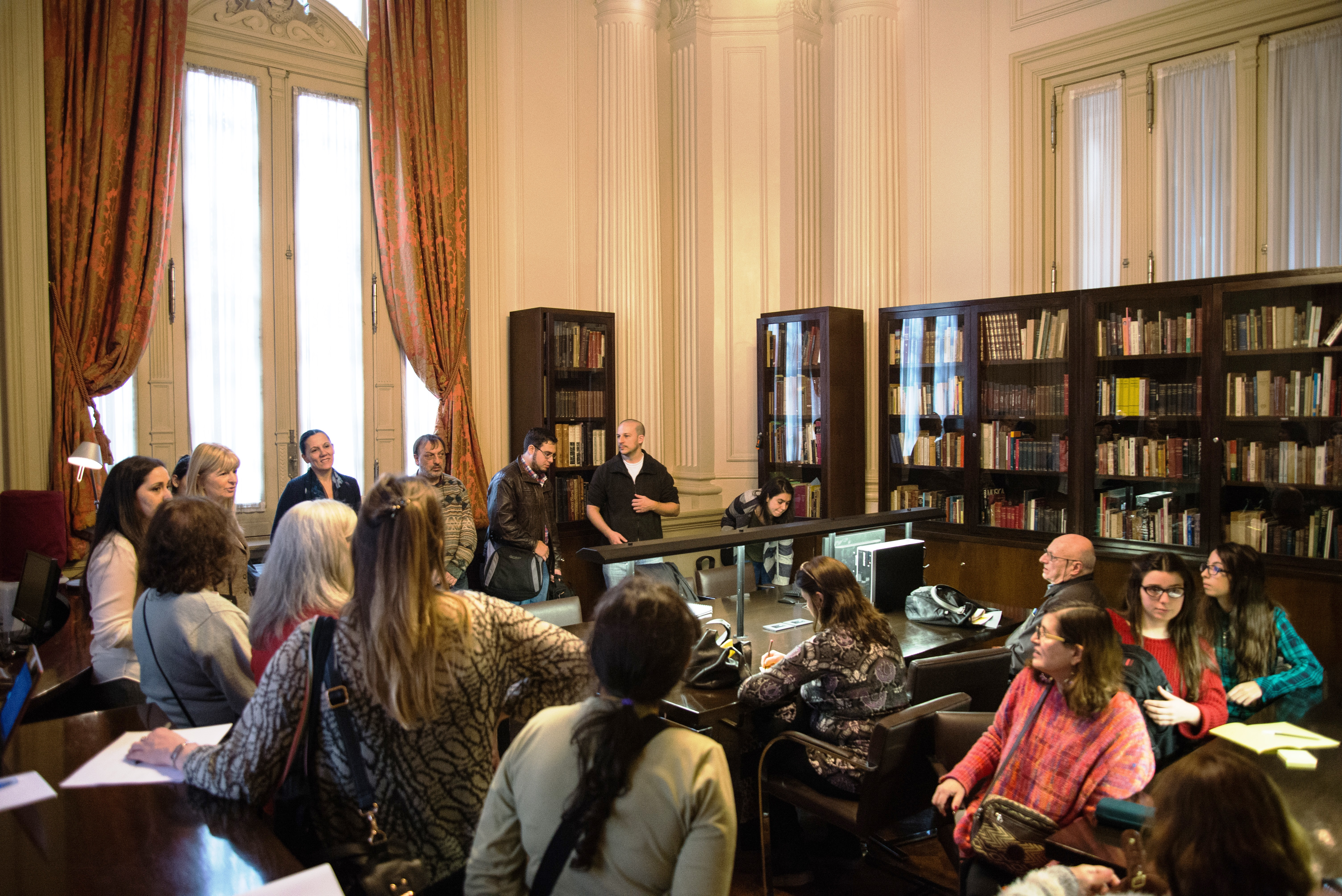 Biblioteca del Teatro Colón durante el Editatón Teatro Colón 2015. En la imagen se observan los asistentes al eventos.